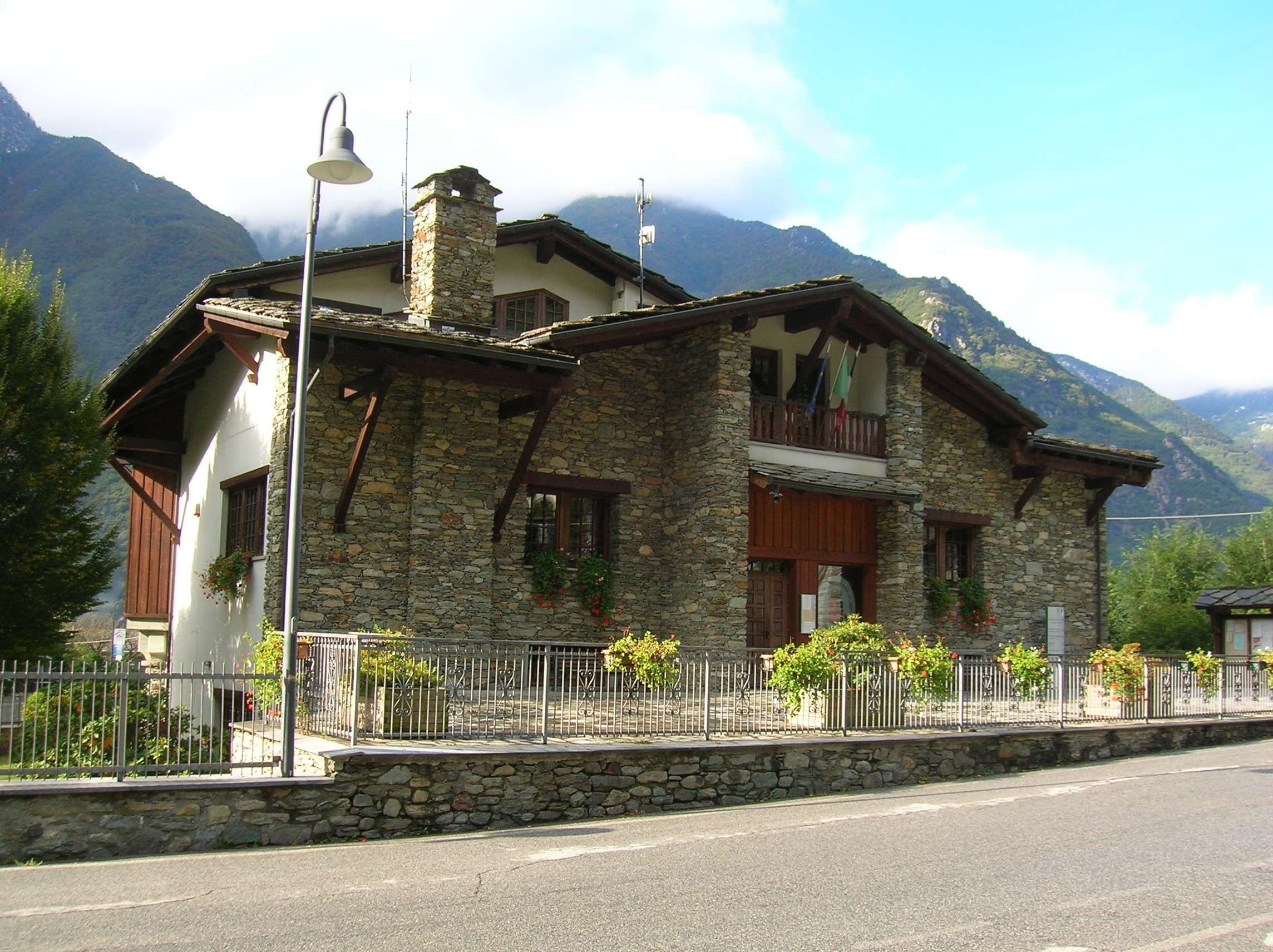 municipio Arnad, Valle d'Aosta, Italia.